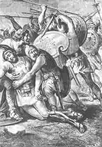 Spartacus